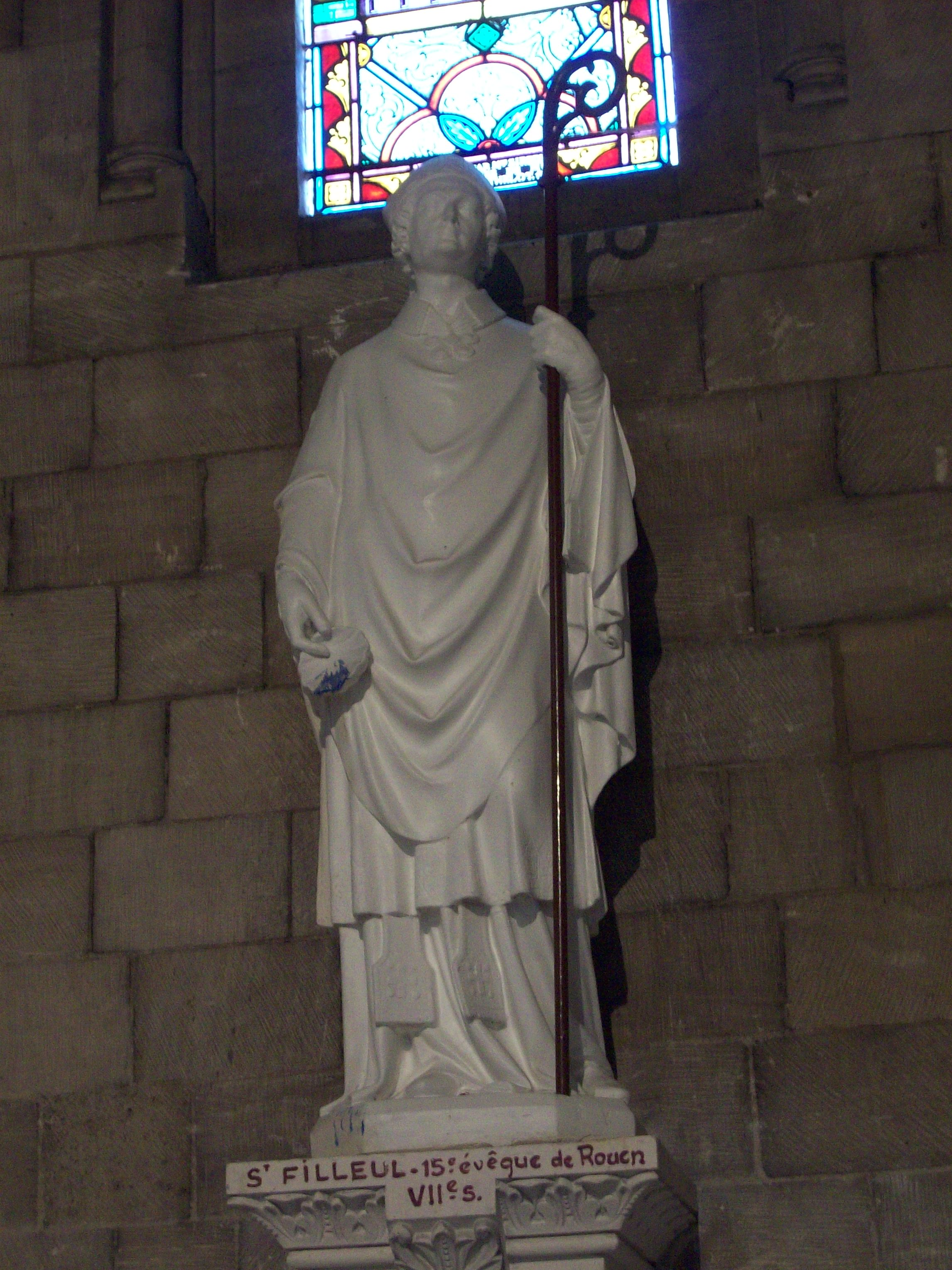 Statue de Saint Filleul, évêque de Rouen du VIe siècle, dans la basilique du Sacré-Coeur de Rouen.